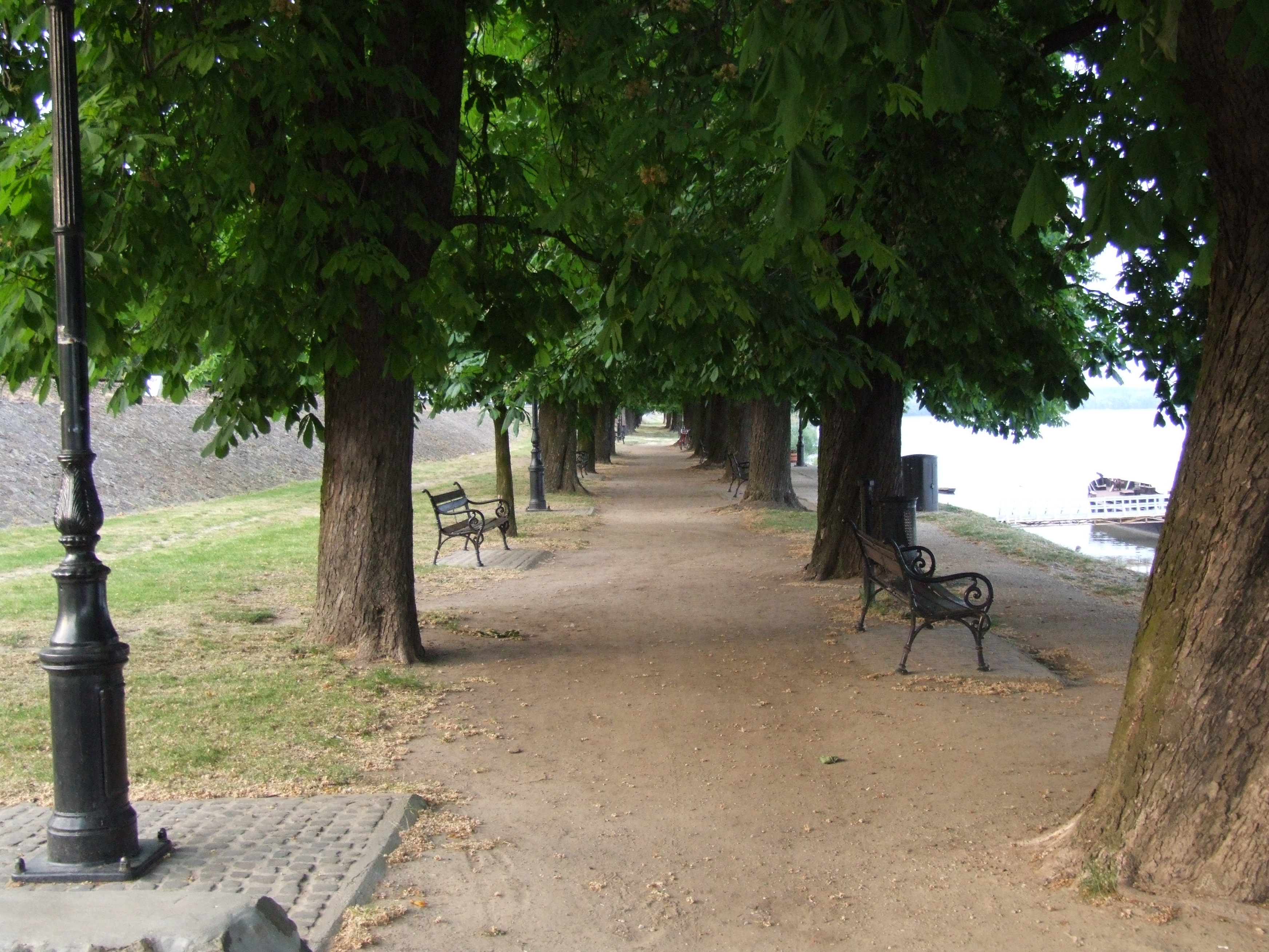 Dunapart, Paks